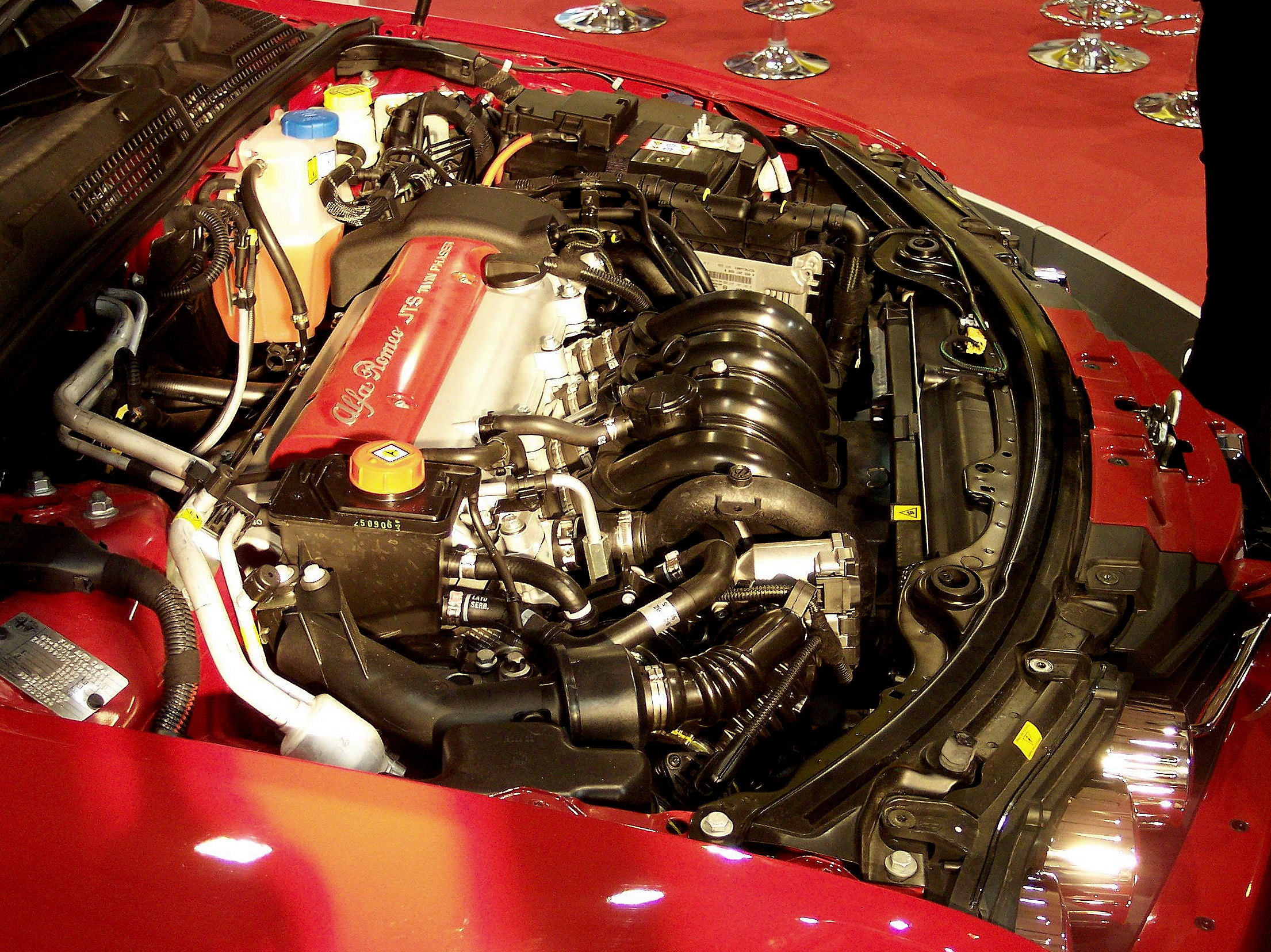 Alfa Romeo Spider 2,2 JTS 2007 engine